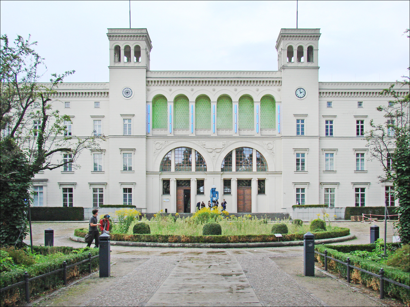 Hamburger Bahnhof est la seule gare en impasse de Berlin à avoir survécu à la dernière guerre.